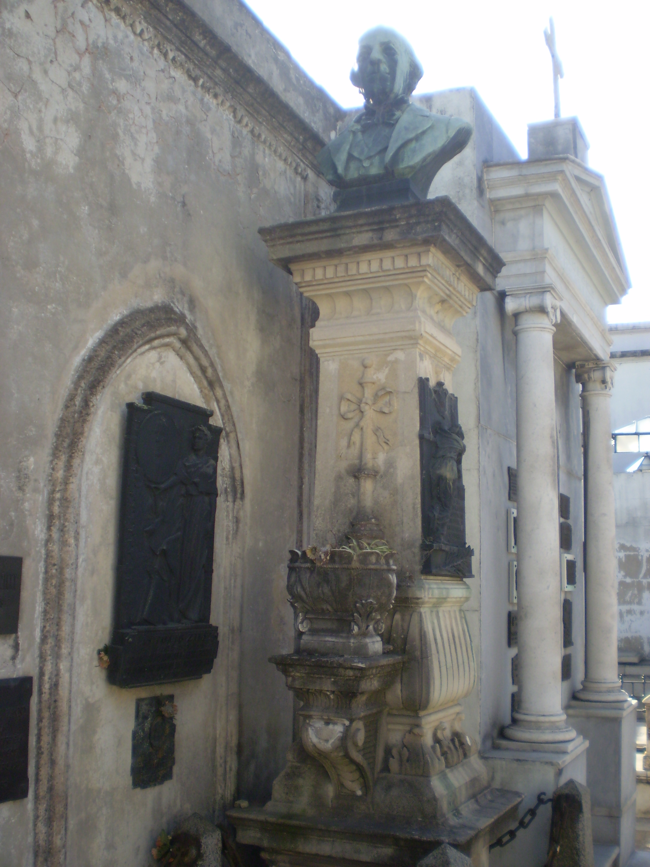 detalle de la tumba del historiador Antonio Zinny. Cementerio de la recoleta. Buenos Aires